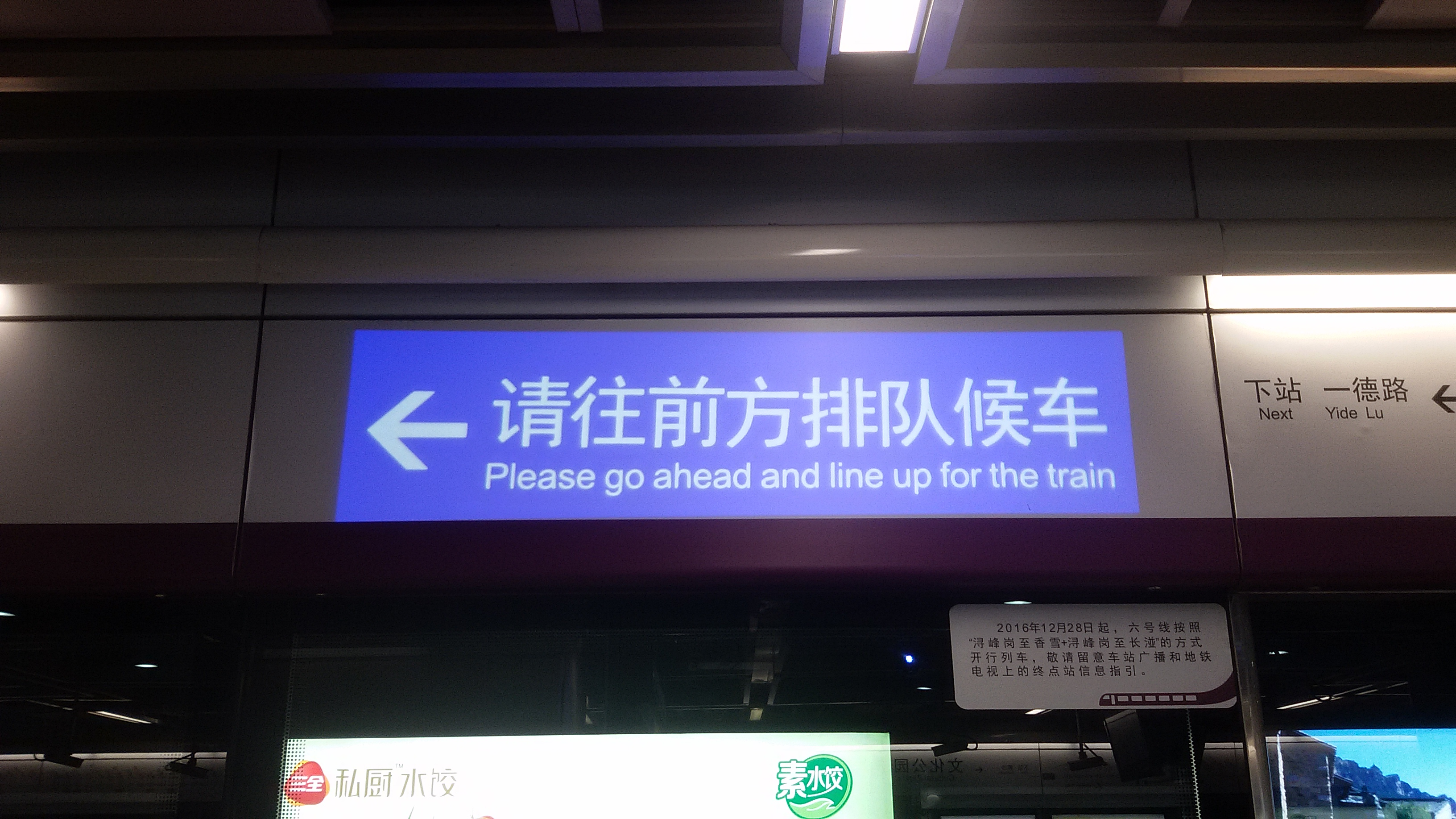 粵語: 喺廣州地鐵——黃沙站嘅6號綫月台範圍，亦出現咗投影燈射出啲乘客提示指引嘅投影字幕。